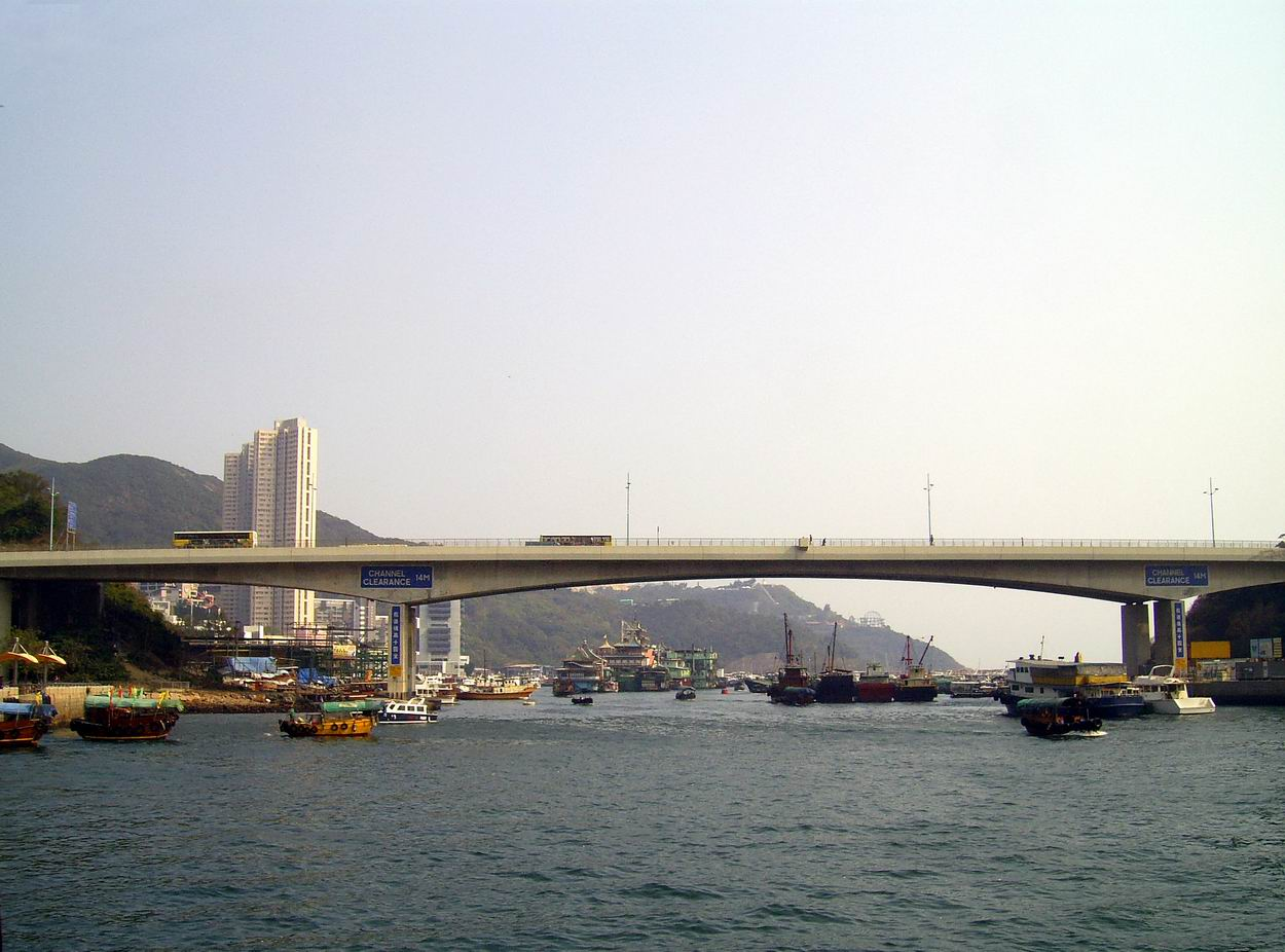 鴨脷洲大橋